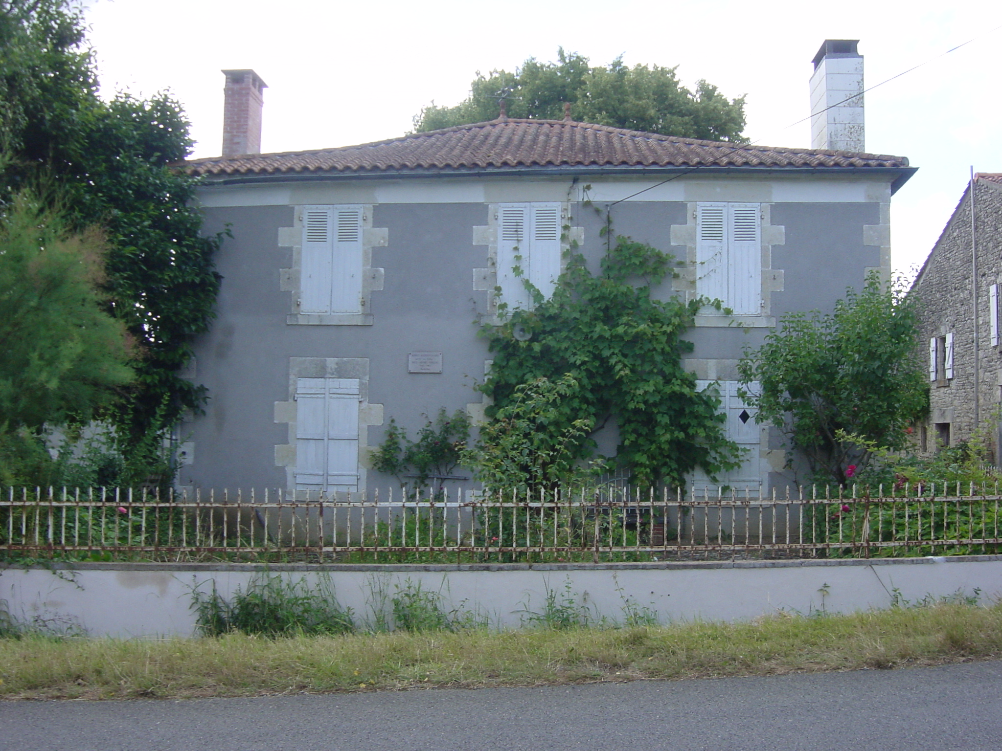 Maison du traducteur et homme de lettres Paul-Henri Tisseau, à Bazoges-en-Pareds, Vendée.